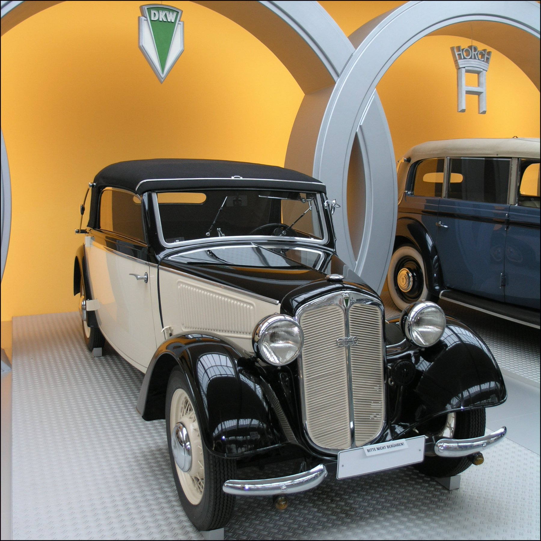 DKW F7 Front-Luxus (1938 / 1938-1939 2288 vozů)